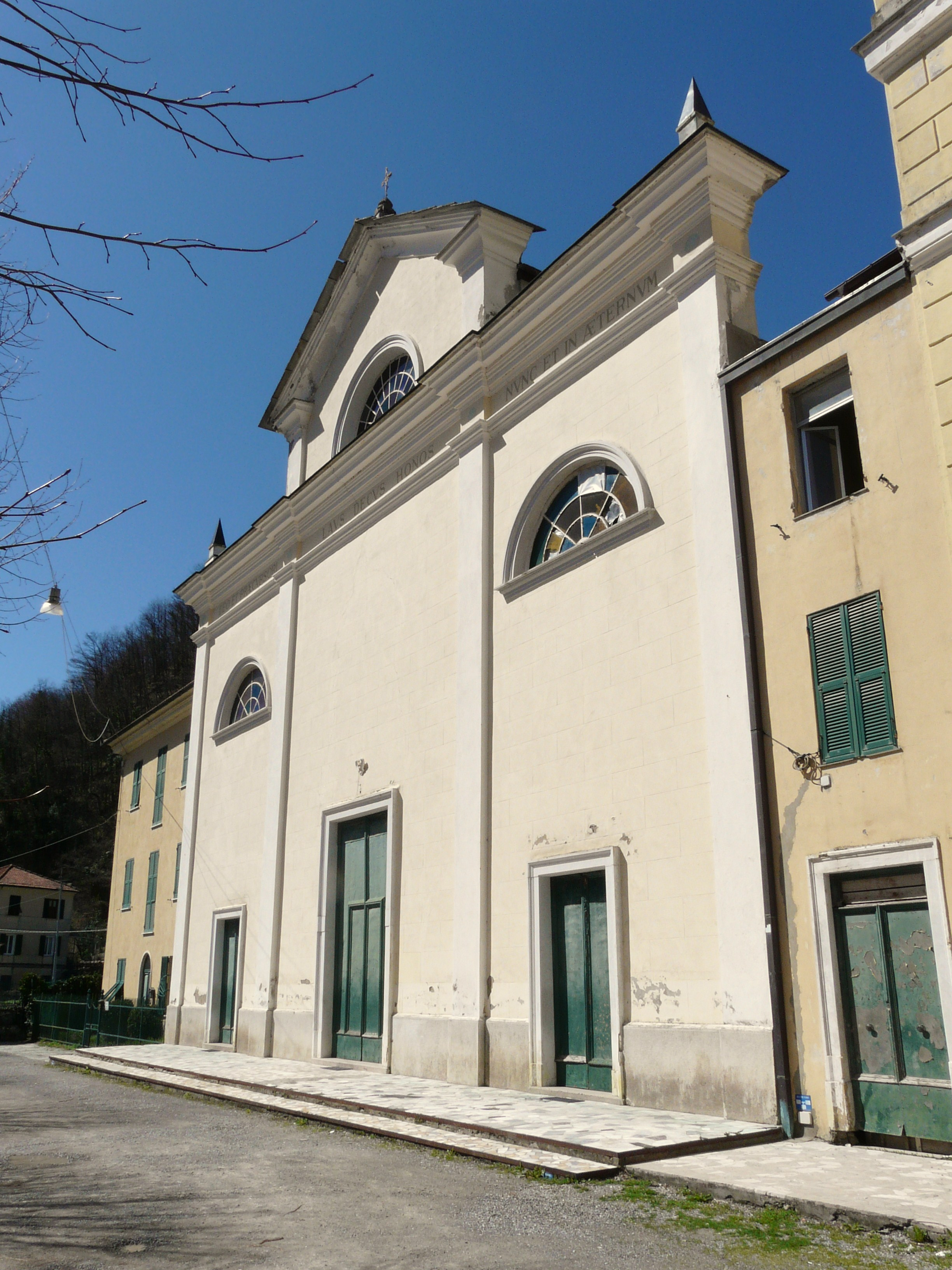 Chiesa di San Giovanni Decollato, Montoggio, Liguria, Italia